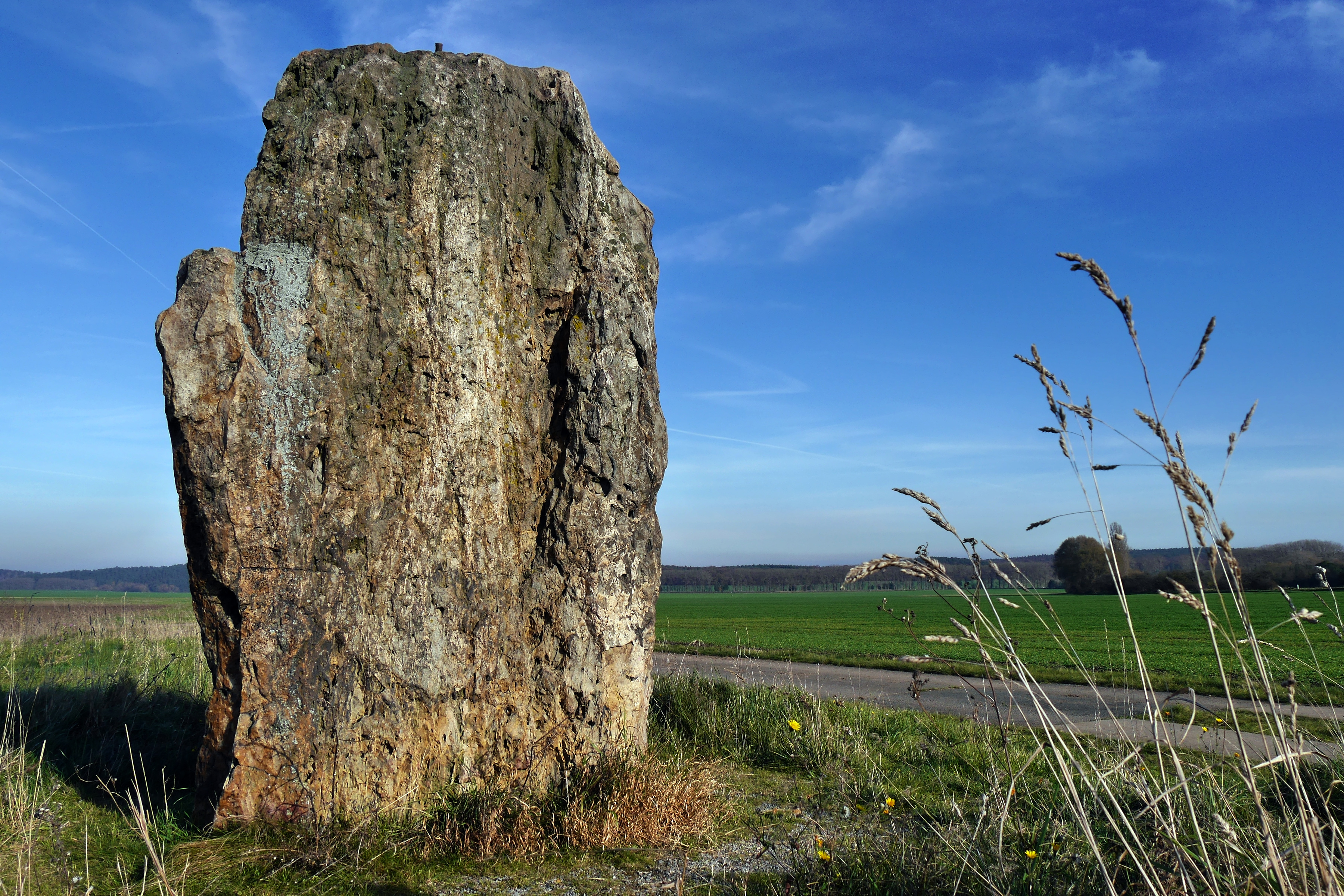 Menhir (Hinkelstein) auf der Feldmark zwischen Derenburg, Heimburg und Benzingerode, ca. 3m hoch